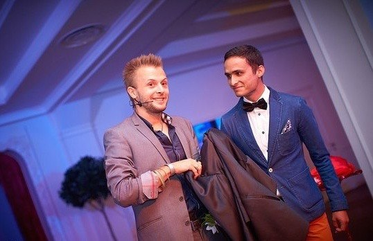 Фокусник иллюзионист Дмитрий Смага и квнщик Игорь Ласточкин